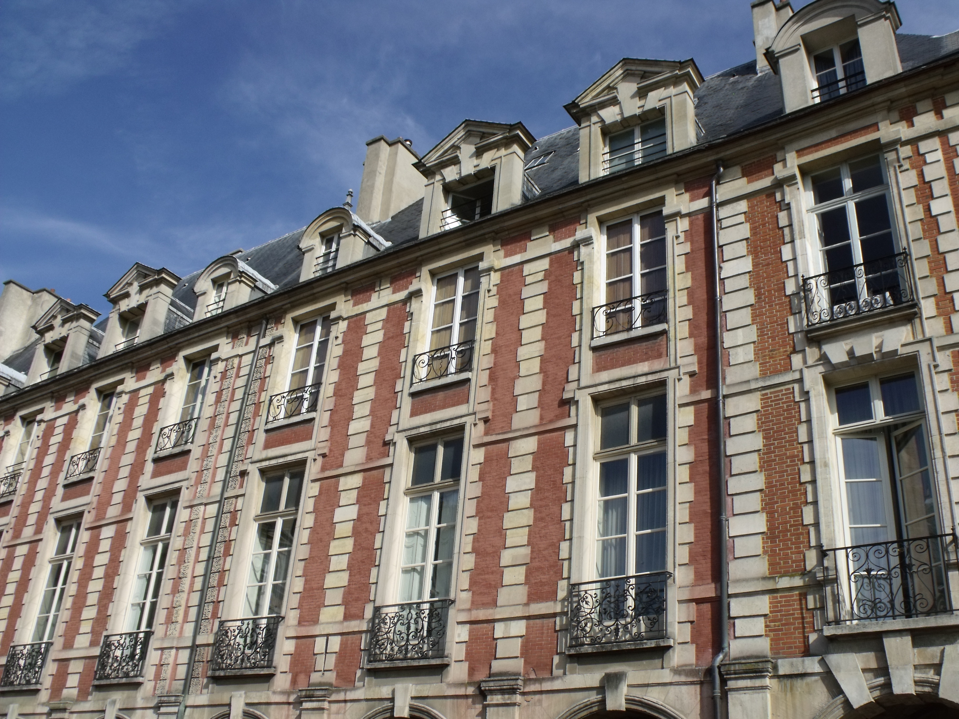 façade de l'Hôtel du Cardinal de Richelieu